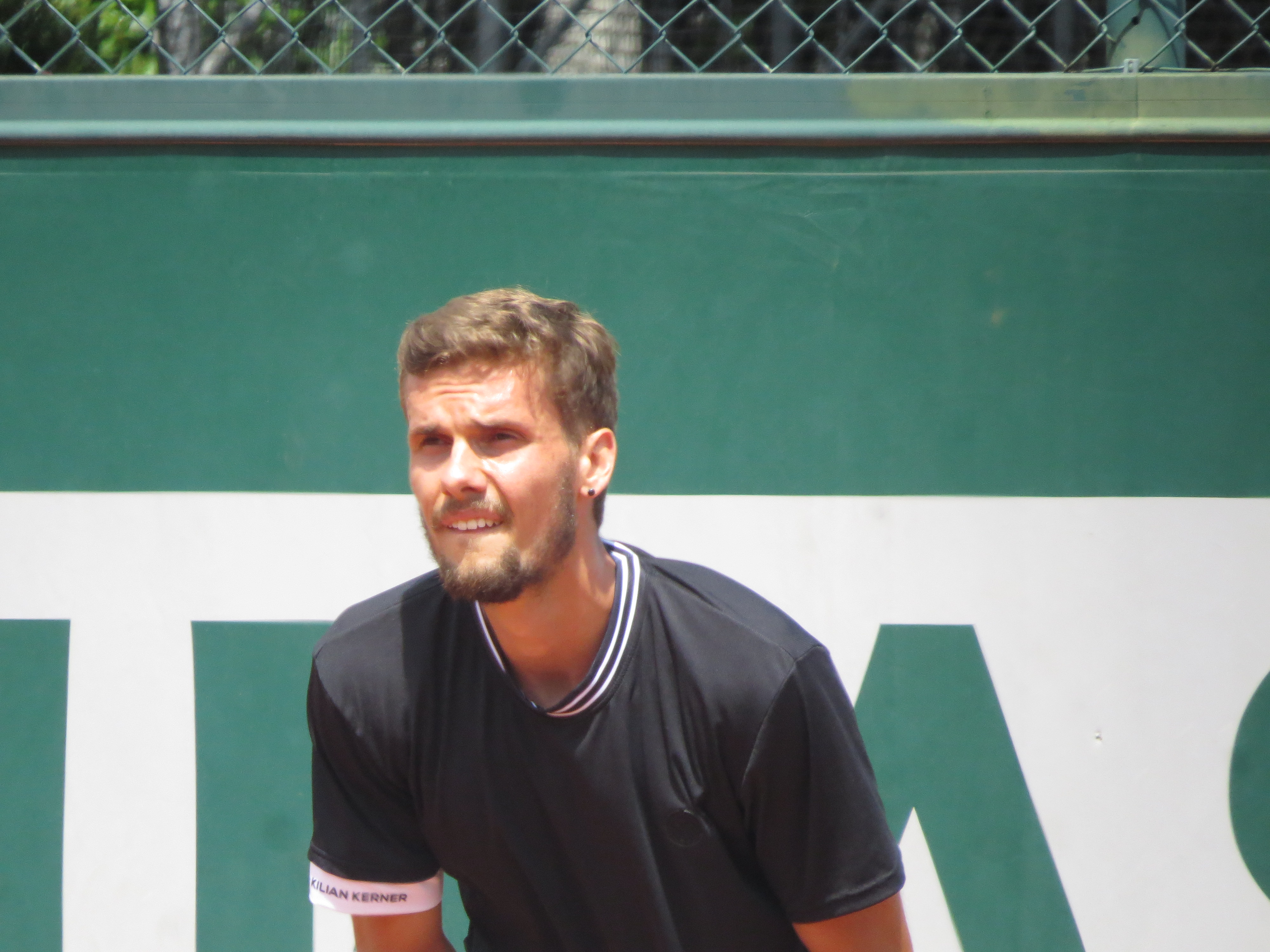 Oscar Otte lors de son deuxième tour des qualifications face à Laslo Đere (court n°18)